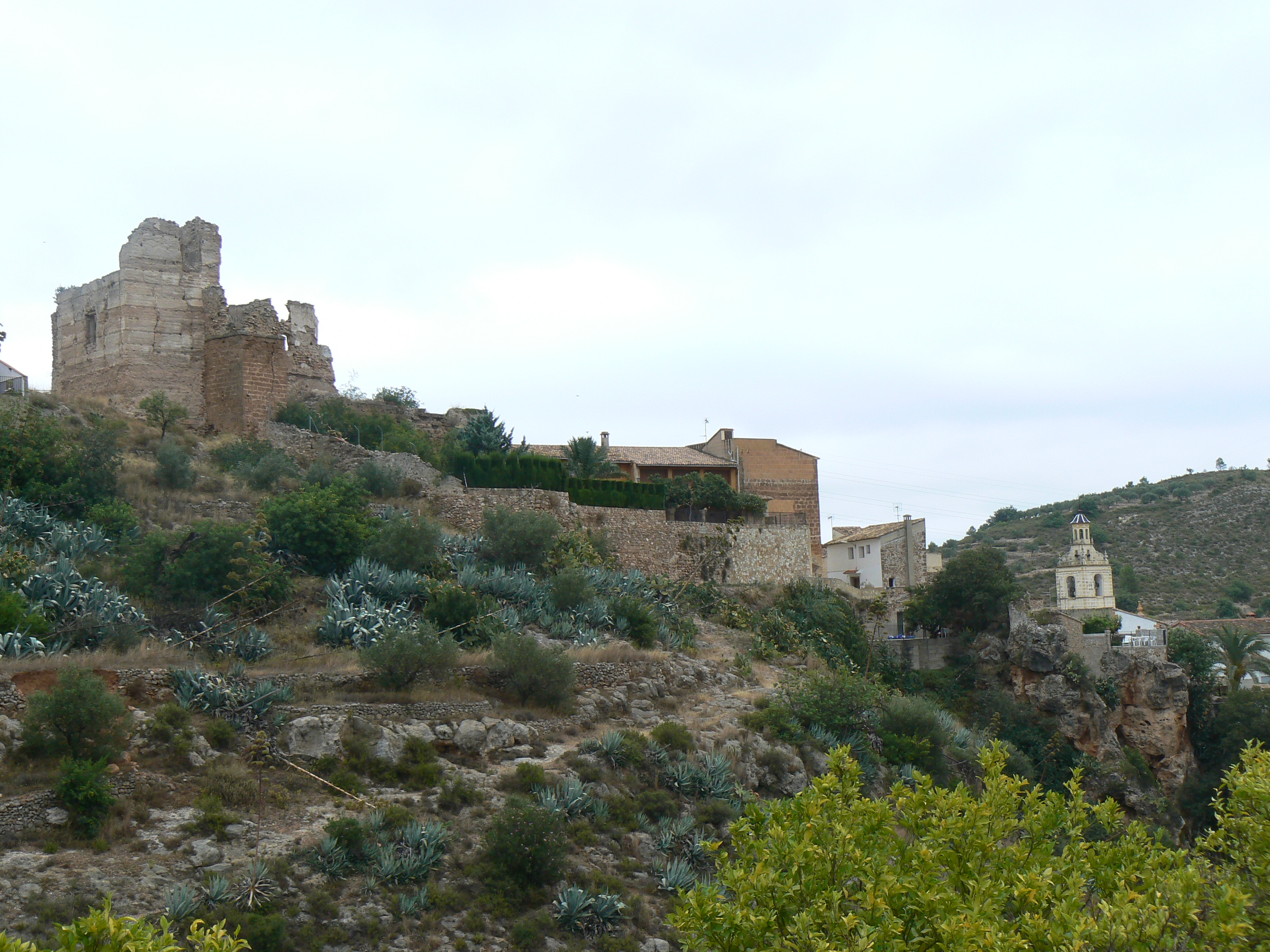 Castillo de Bolbaite